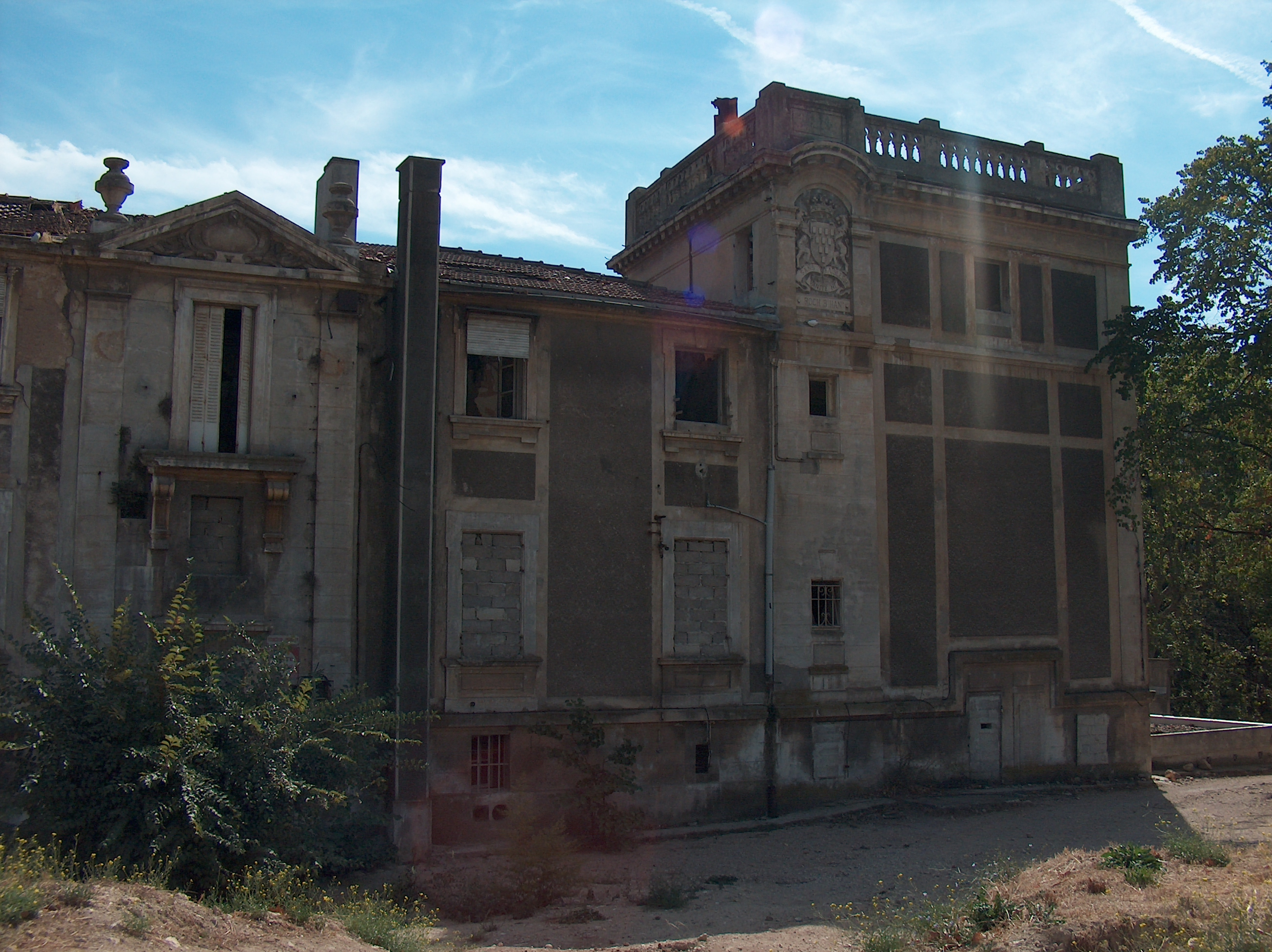 Façade nord du château Saint-Antoine, Marseille